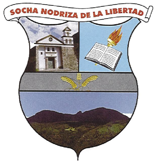 Escudo del municipio de Socha